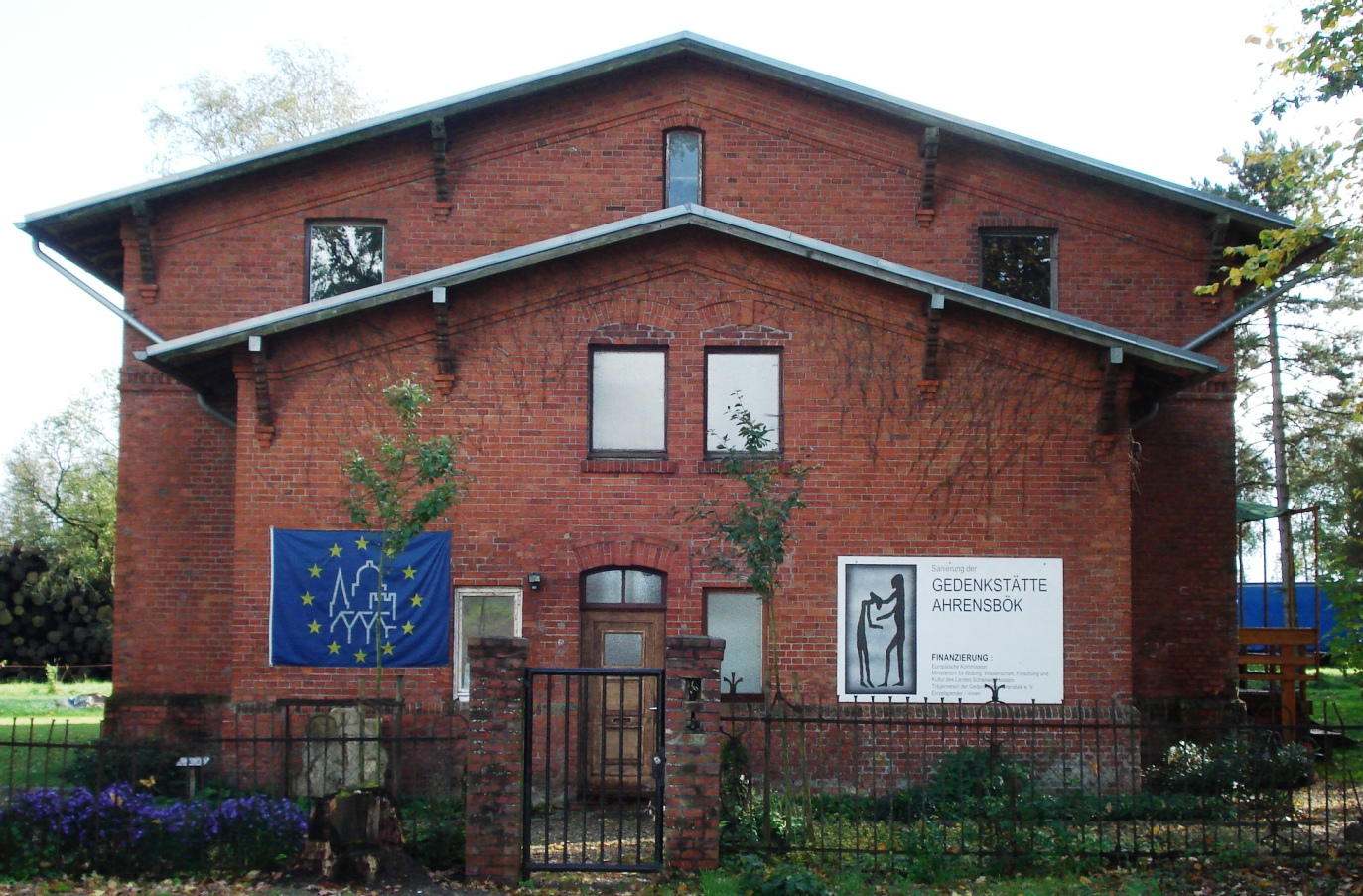 Die Gedenkstaette / Gebäude des KZ Ahrensboek